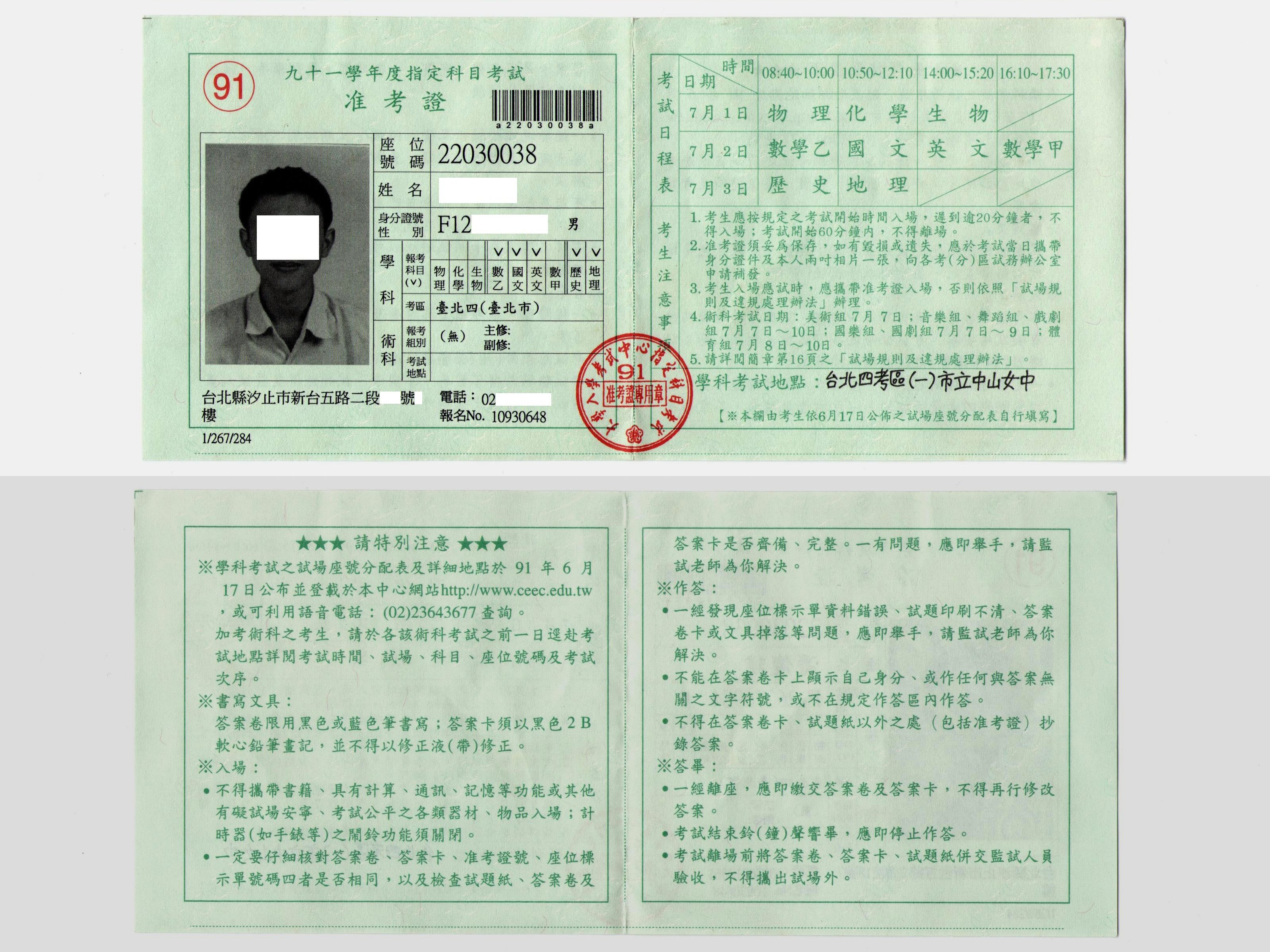 中華民國91學年度大學入學考試中心基金會指定科目考試准考證。上為正面，下為反面。